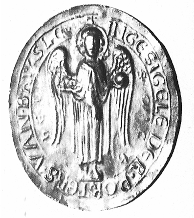 Zegel van de stad Brussel uit 1257. Middelnederlands randschrift: INGESIGELE · DER · PORTERS · VAN · BRUSLE (zegel der poorters van Brussel). Afbeelding: aartsengel Michaël.